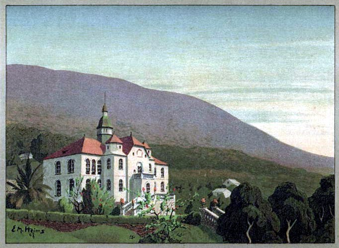 Gouvernementshaus in Buea (Kamerun), (Im Hintergrund der Kamerunberg)